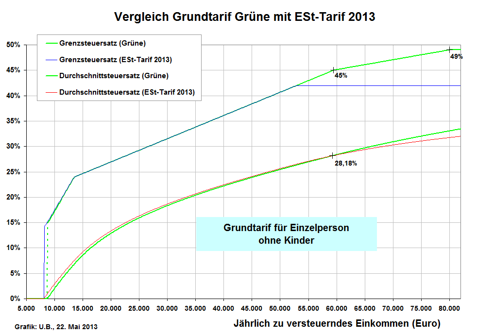 Tarifgrafik "grünes Steuermodell" für ZDFcheck 2013 erstellt